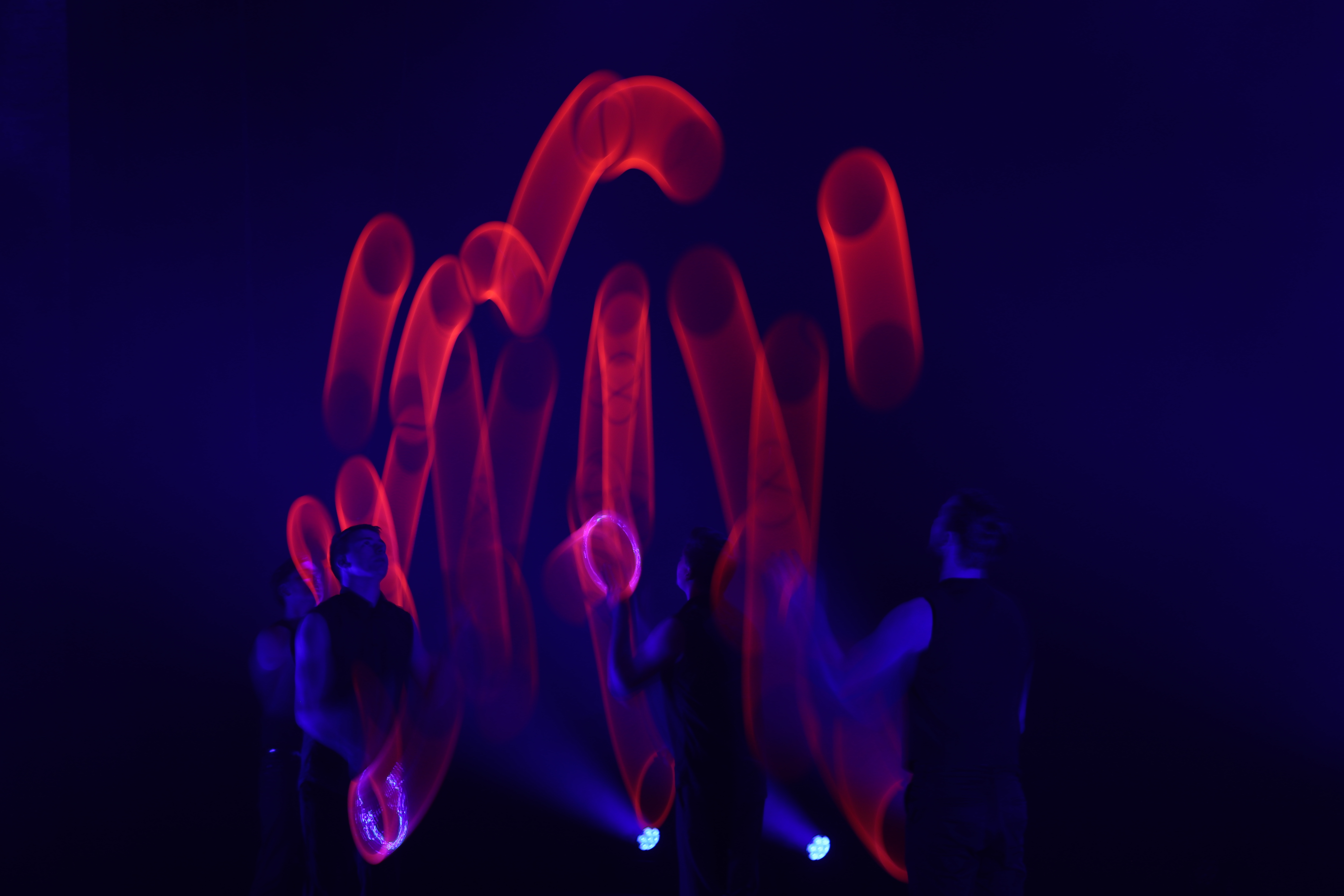 Die gruppe Jonglissimo mit Manuel Mitasch (links) bei einem Auftritt auf der Tournee des Showtheaters Traumfabrik 2019/2020